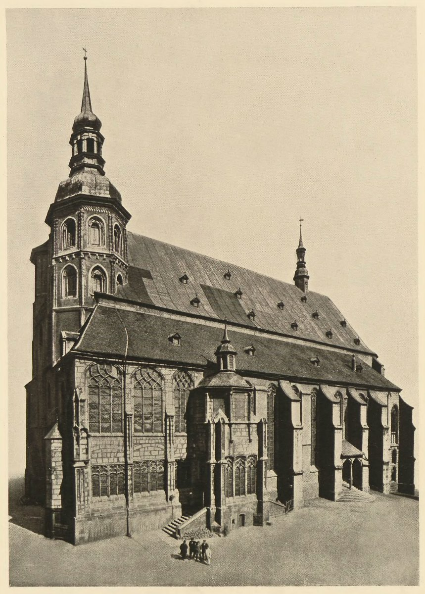 Peterskirche in Görlitz vor der neugotischen Aufstockung der Türme. 1497 durch den sächsischen Baumeister Conrad Pflüger vollendet.